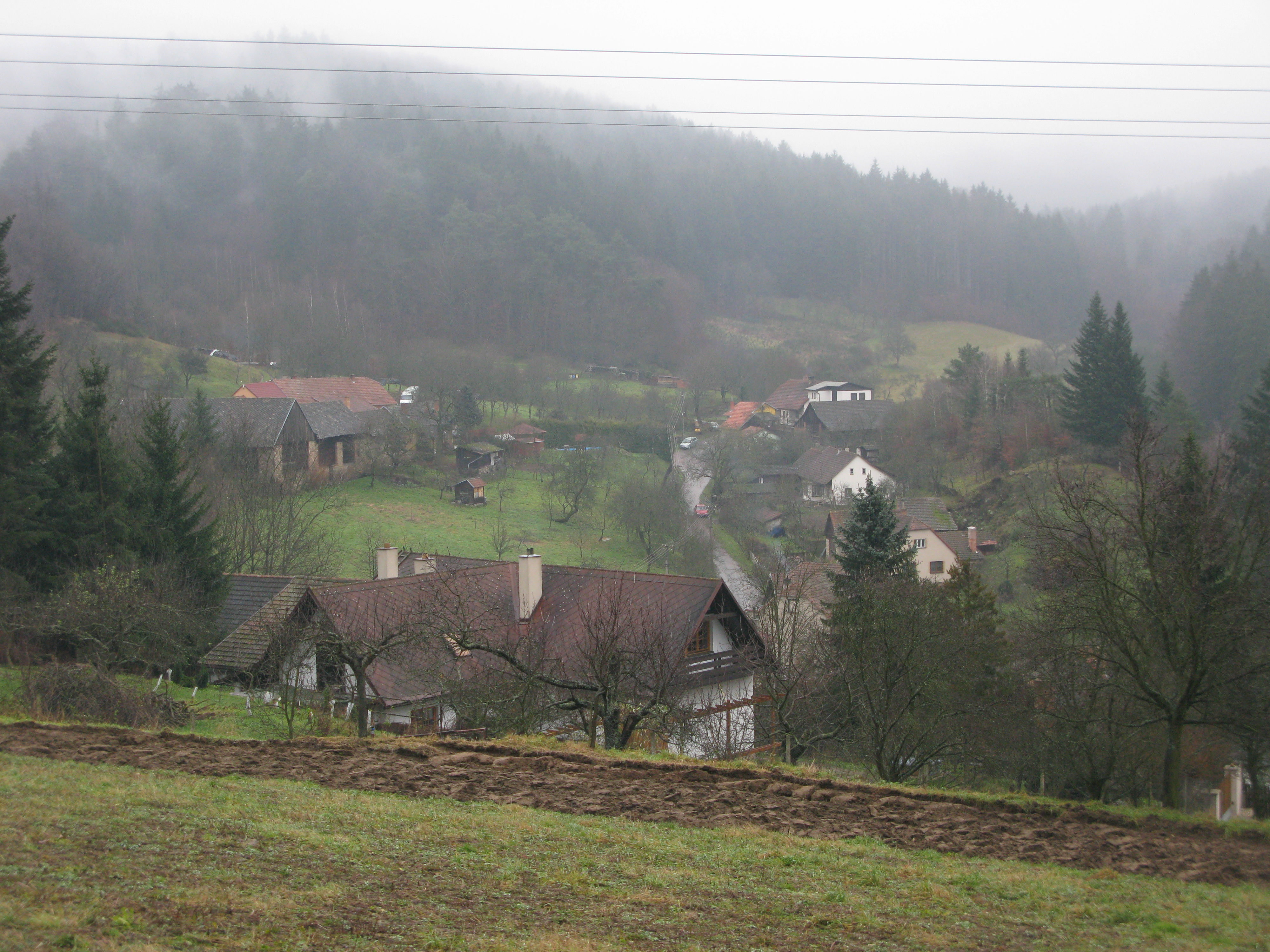 Pohled na obec Křeptov (Běleč)